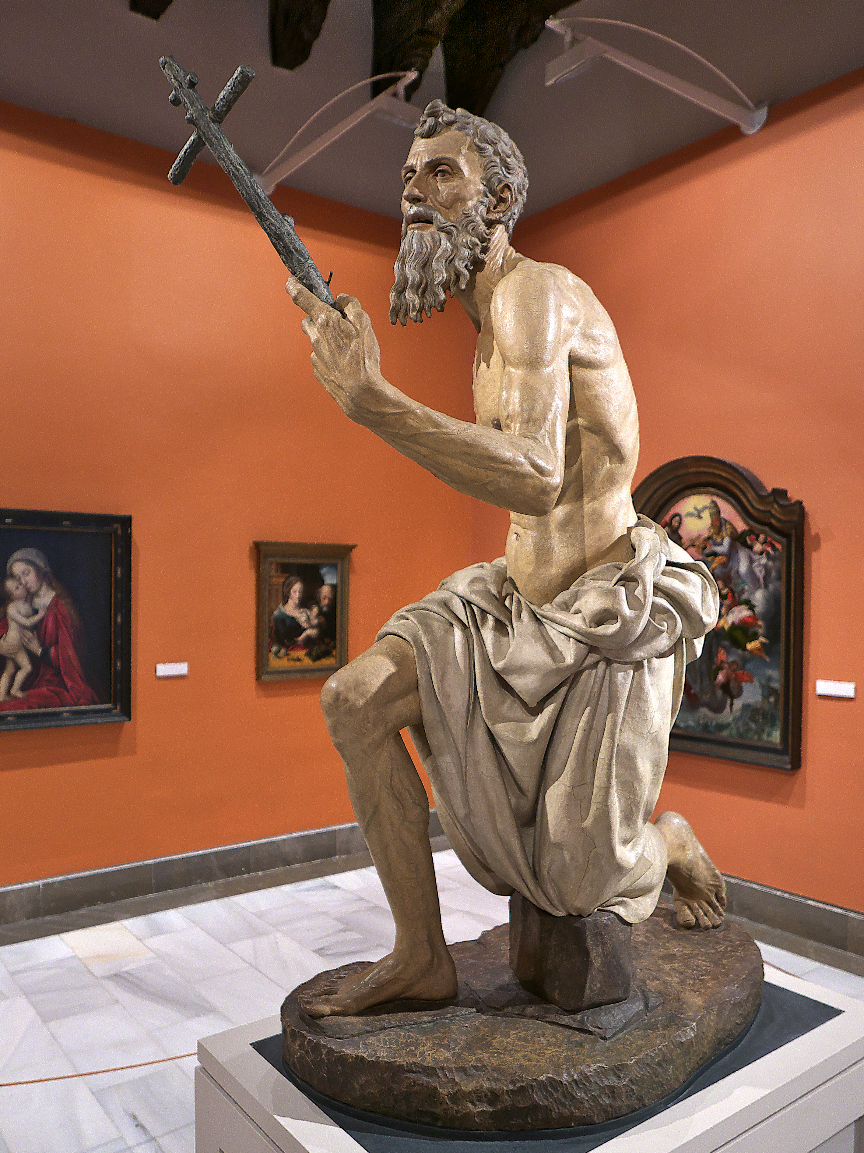 Pietro Torrigiano, sin causa conocida, se instala (1522) en el Monasterio de San Jerónimo de Buenavista, donde posiblemente, modela en barro cocido para el monasterio jerónimo, el universal San Jerónimo Penitente.